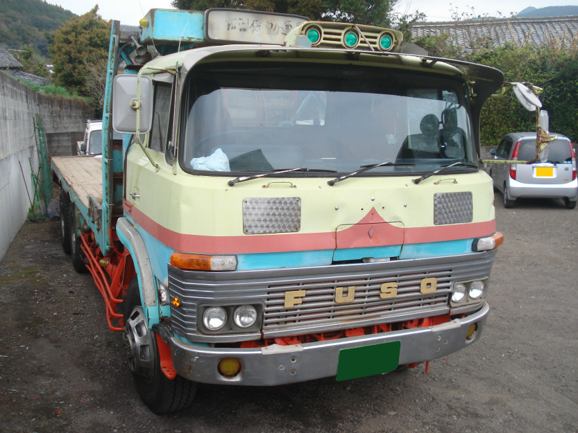 FV後期型 セルフローダー